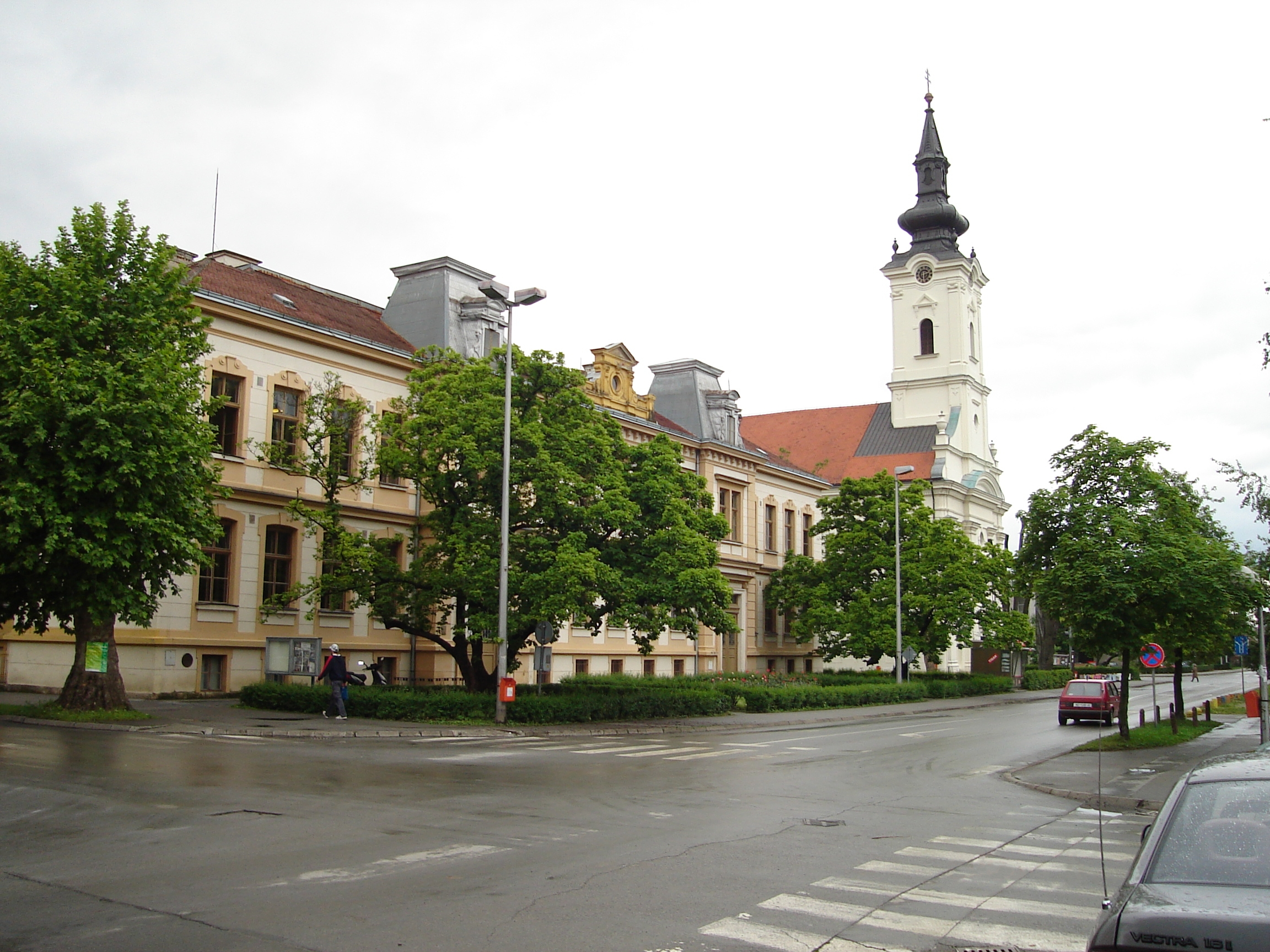 Nova-Gradiska (Croatia) - Centrum